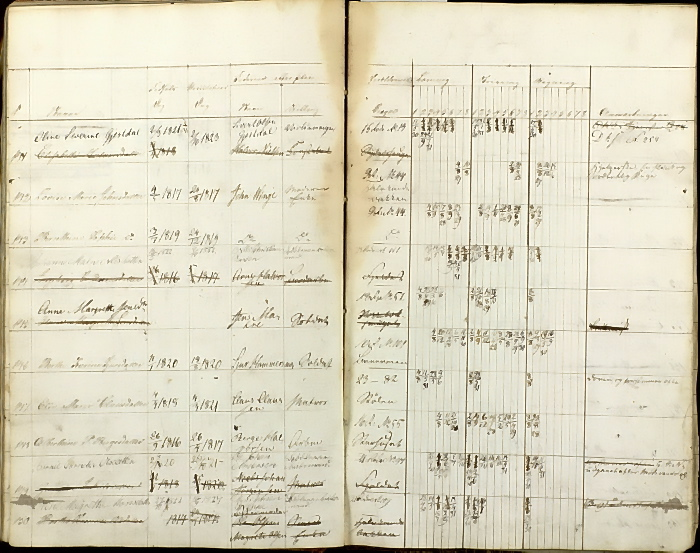 To sider fra en innføringsprotokoll for jenter, 1826-1848. Fra arkivet etter vexelundervisningen, oppbevart ved Bergen Byarkiv.